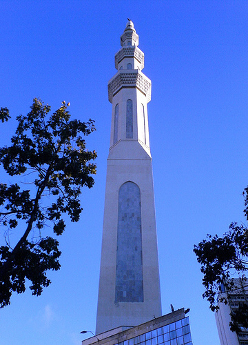 Sheikh Ibrahim Bin Abdulaziz Al - Ibrahim Mosque, Caracas, Venezuela.